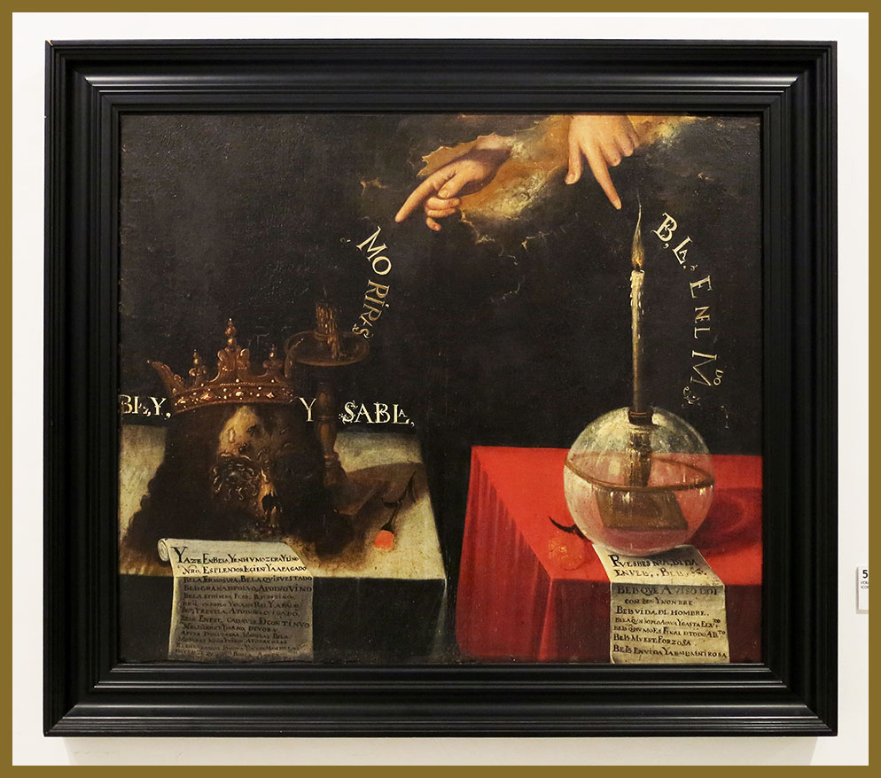 Vanitas (Morirás bella Isabela) (1639), de Francisco Velázquez Vaca, monasterio de San Quirce, Valladolid.